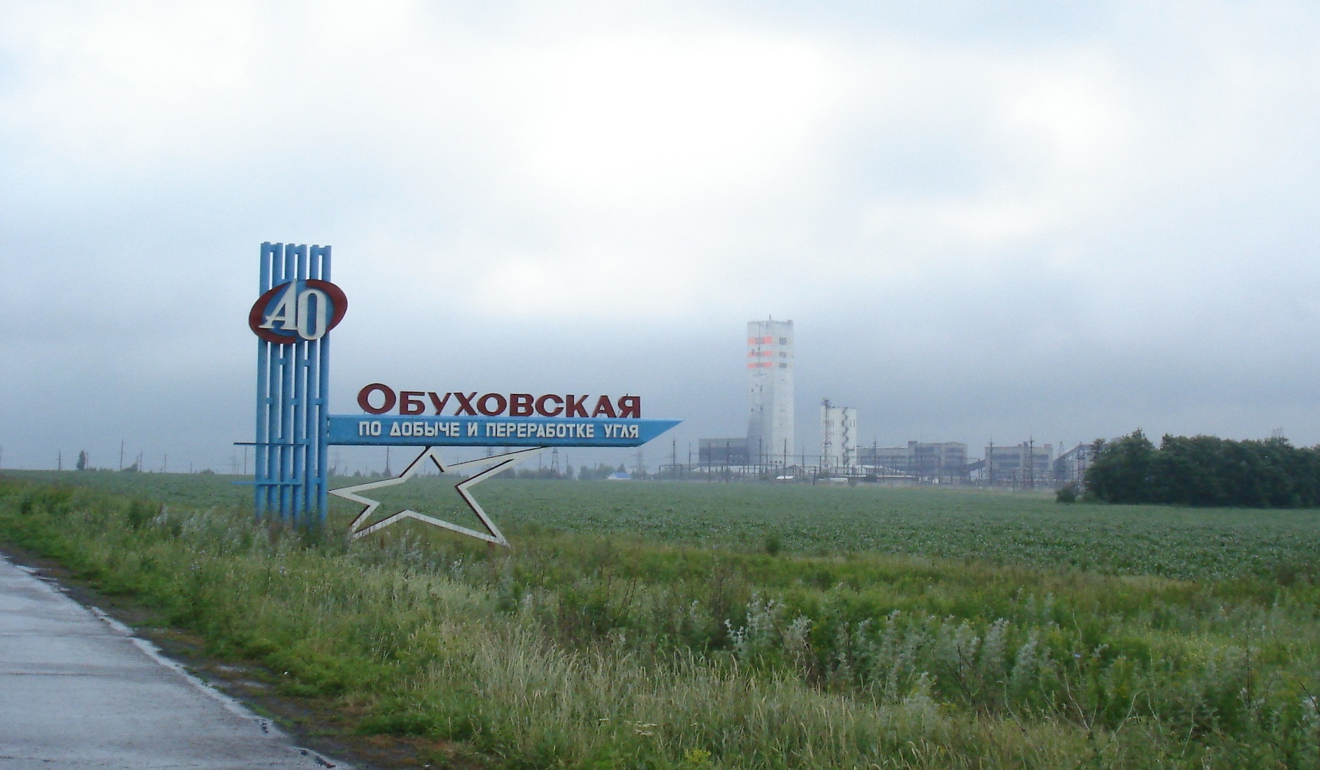 Шахта АО "Обуховская" в Зверево